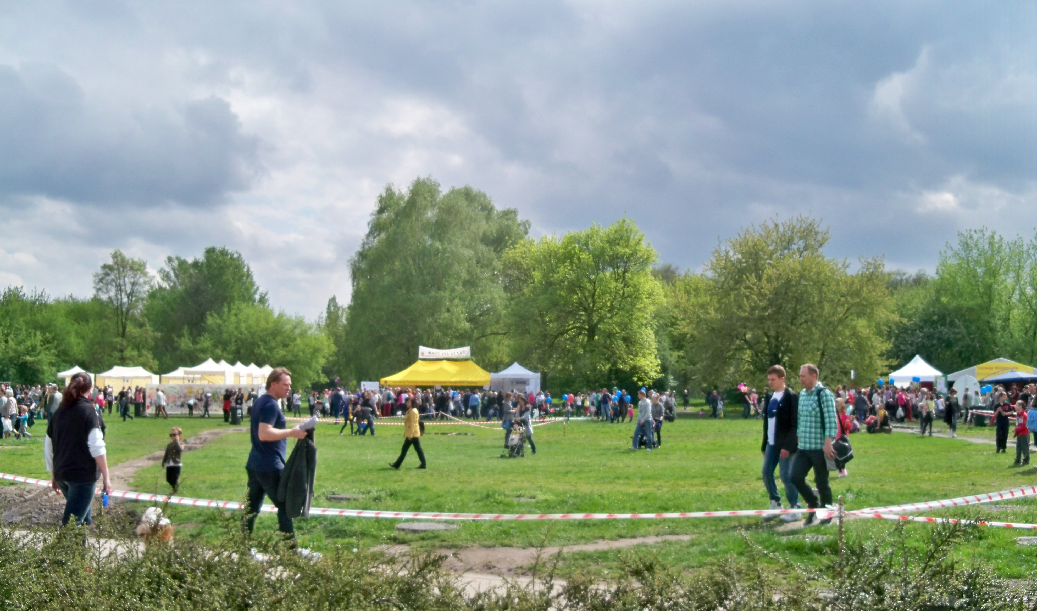 Festyn z okazji Dnia Ziemi 2014 w Warszawie na Polu Moktowskim